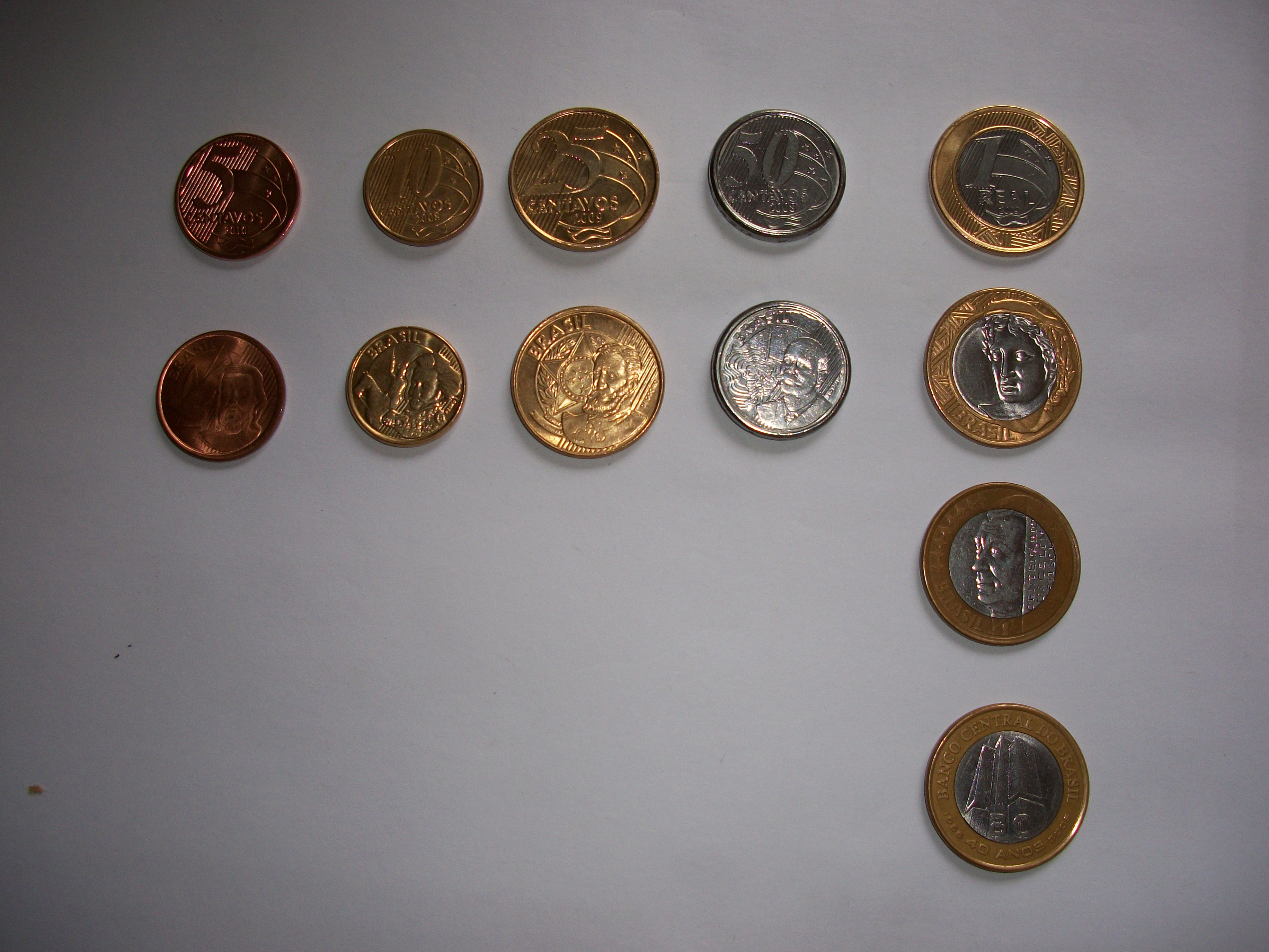 As moedas de Real vigentes em 2010.